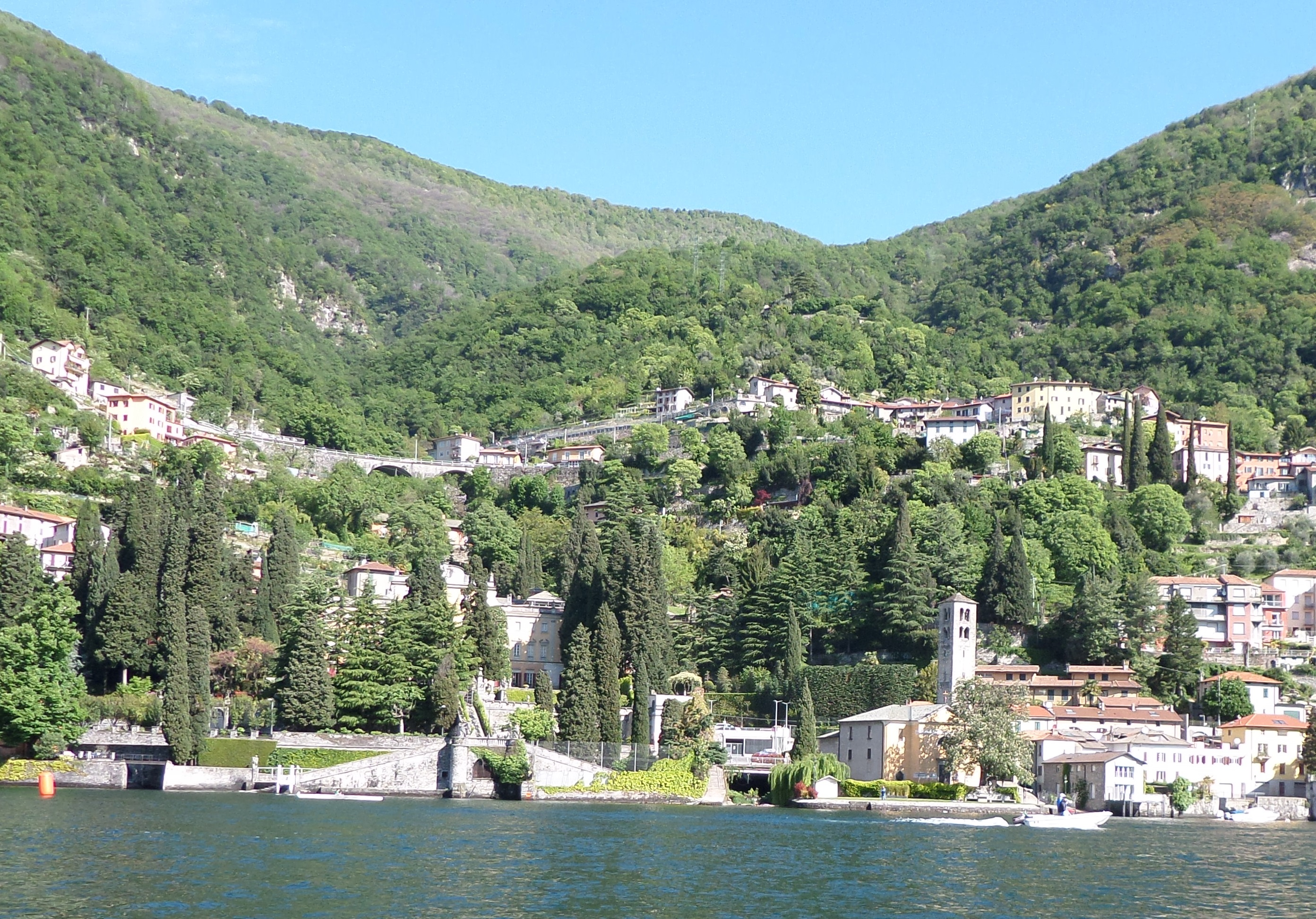 Urio - Lago di Como